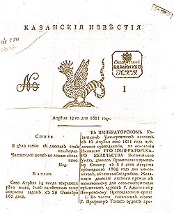 Первая полоса первого номера «Казанских известий» за 19 апреля 1811 года.